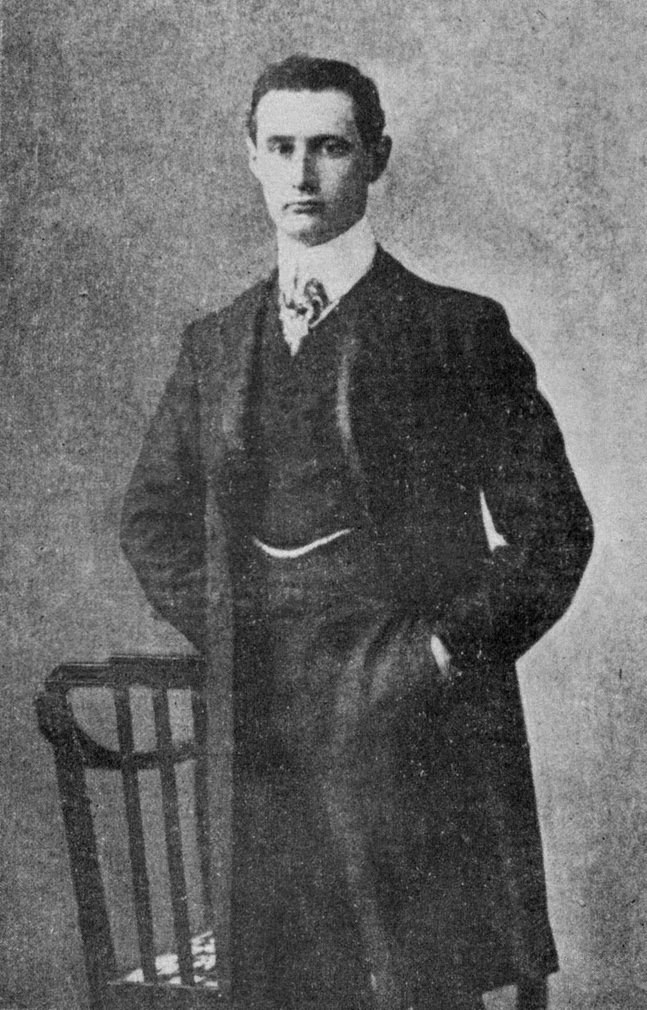 Pedro Subercaseaux Errázuriz (1880-1956) fue un connotado pintor chileno, célebre por sus obras que ilustran la historia y las costumbres de Chile, caracterizadas por la profunda asertividad y minuciosidad de los detalles de los personajes que retrata. Su arte está también reflejado en dibujos y retratos de santos, en particular San Francisco de Asís.